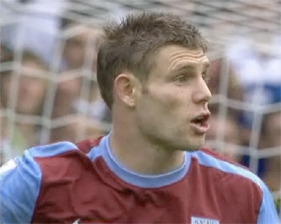 穿上阿士東維拉球衣的占士米拿